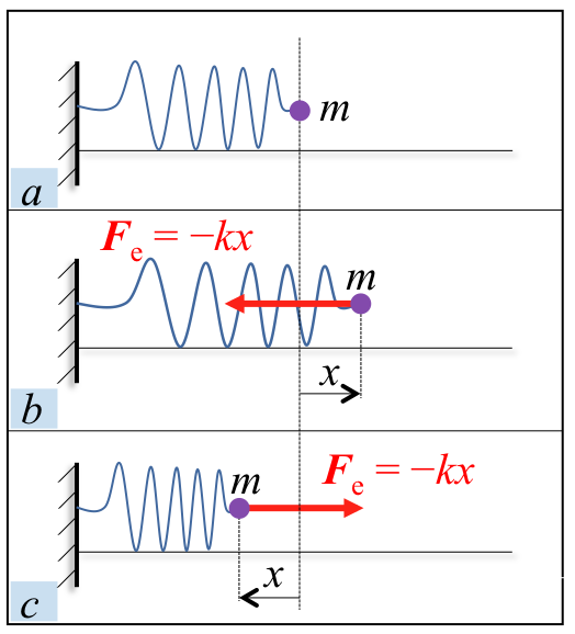 Malguki bati lotuta dagoen masa baten oszilazioen eskema, indar elastikoa adieraziz.